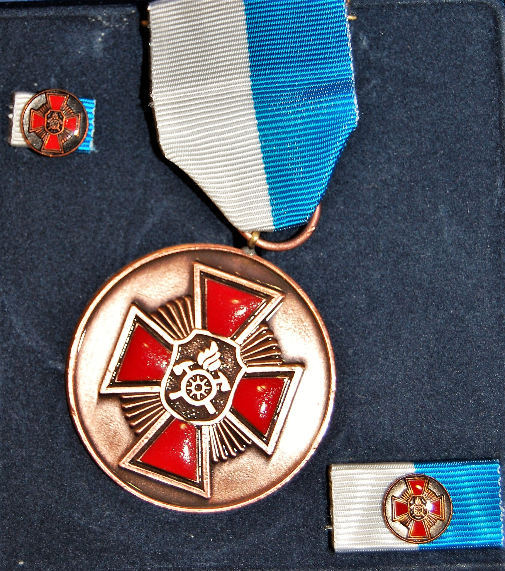 Ehrenmedaille des Bayerischen Feuerwehrverbandes, verliehen an Privatpersonen für Verdienste um die Feuerwehr